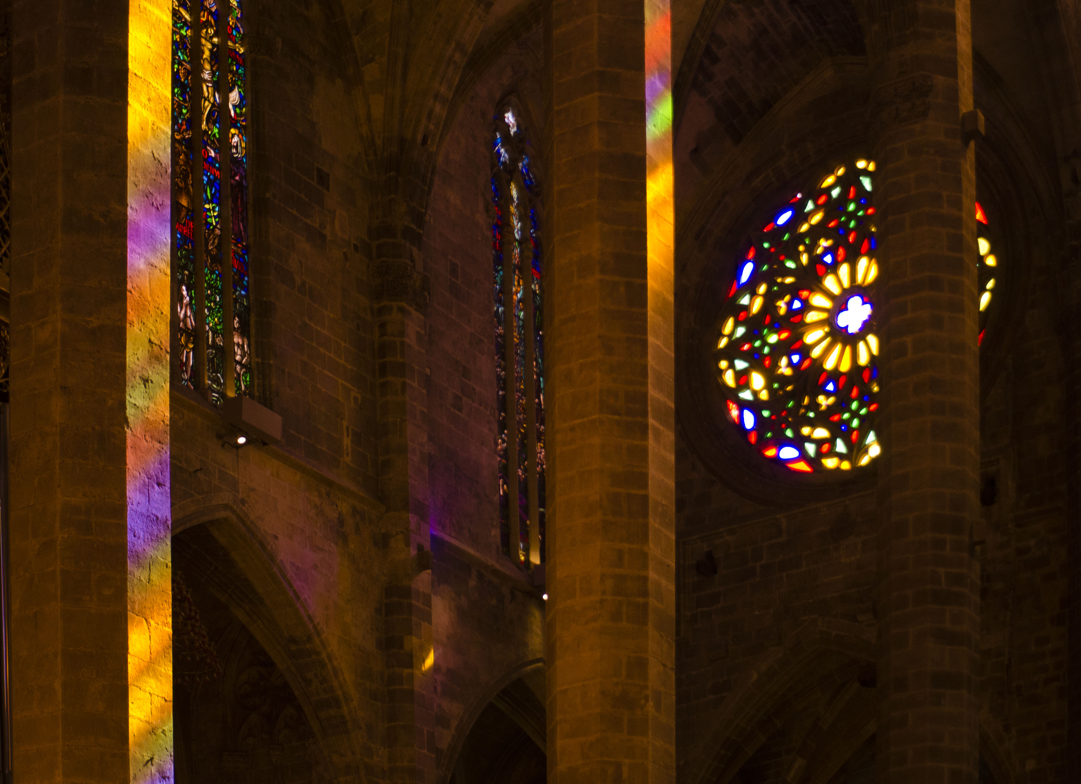 Palma de Mallorca, cathedral, interior